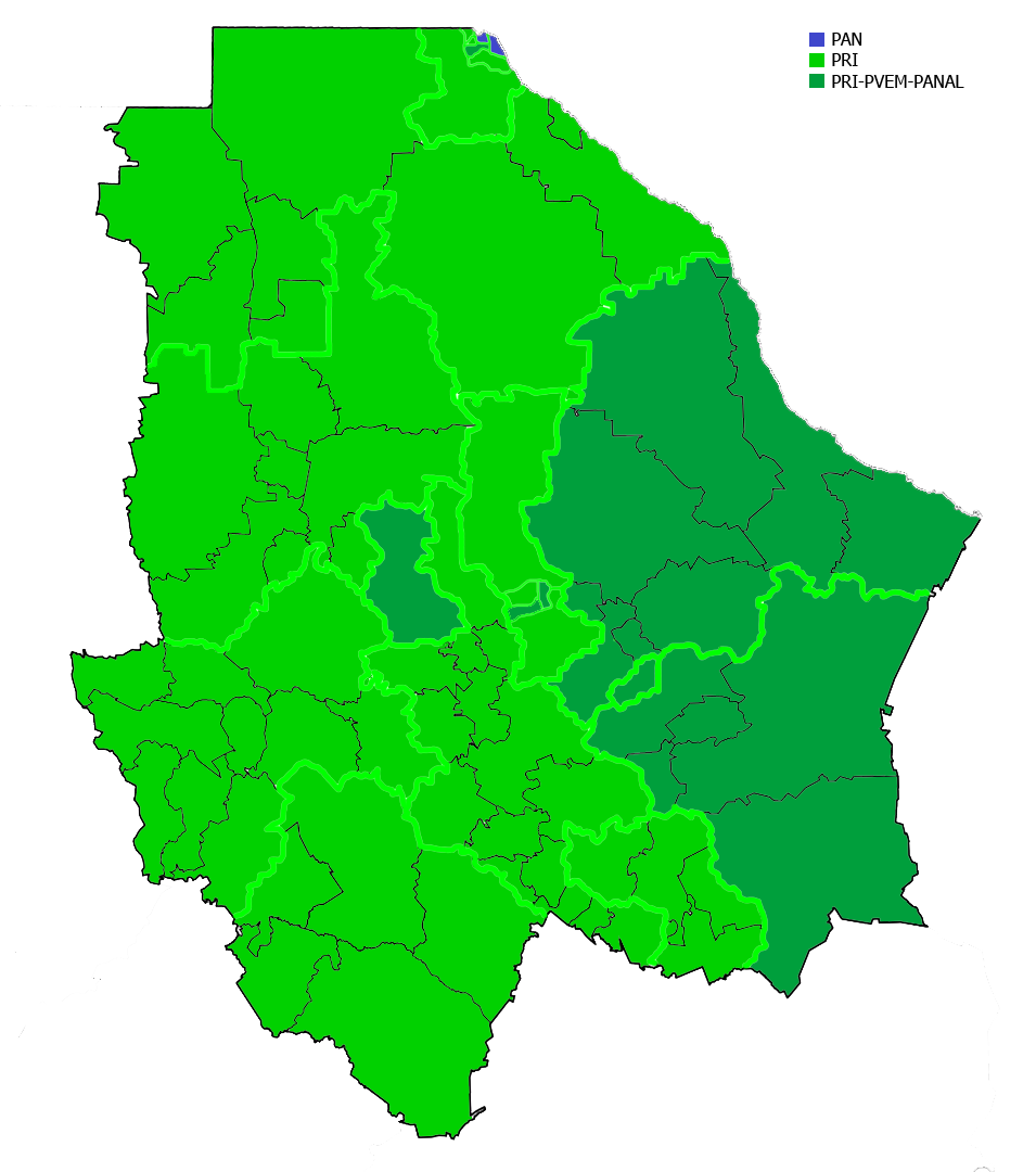 Diputados locales electos en el Estado de Chihuahua en 2010 por partido.